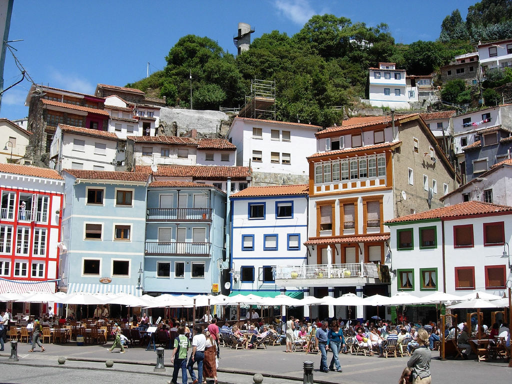 Esta si es la tipica postal de Cudillero y el lugar preferido de los veraneantes para degustar los productos del mar.